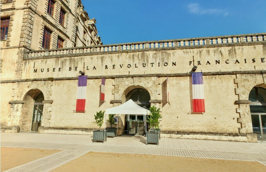 Entrée du musée de la Révolution française, Vizille (Isère).